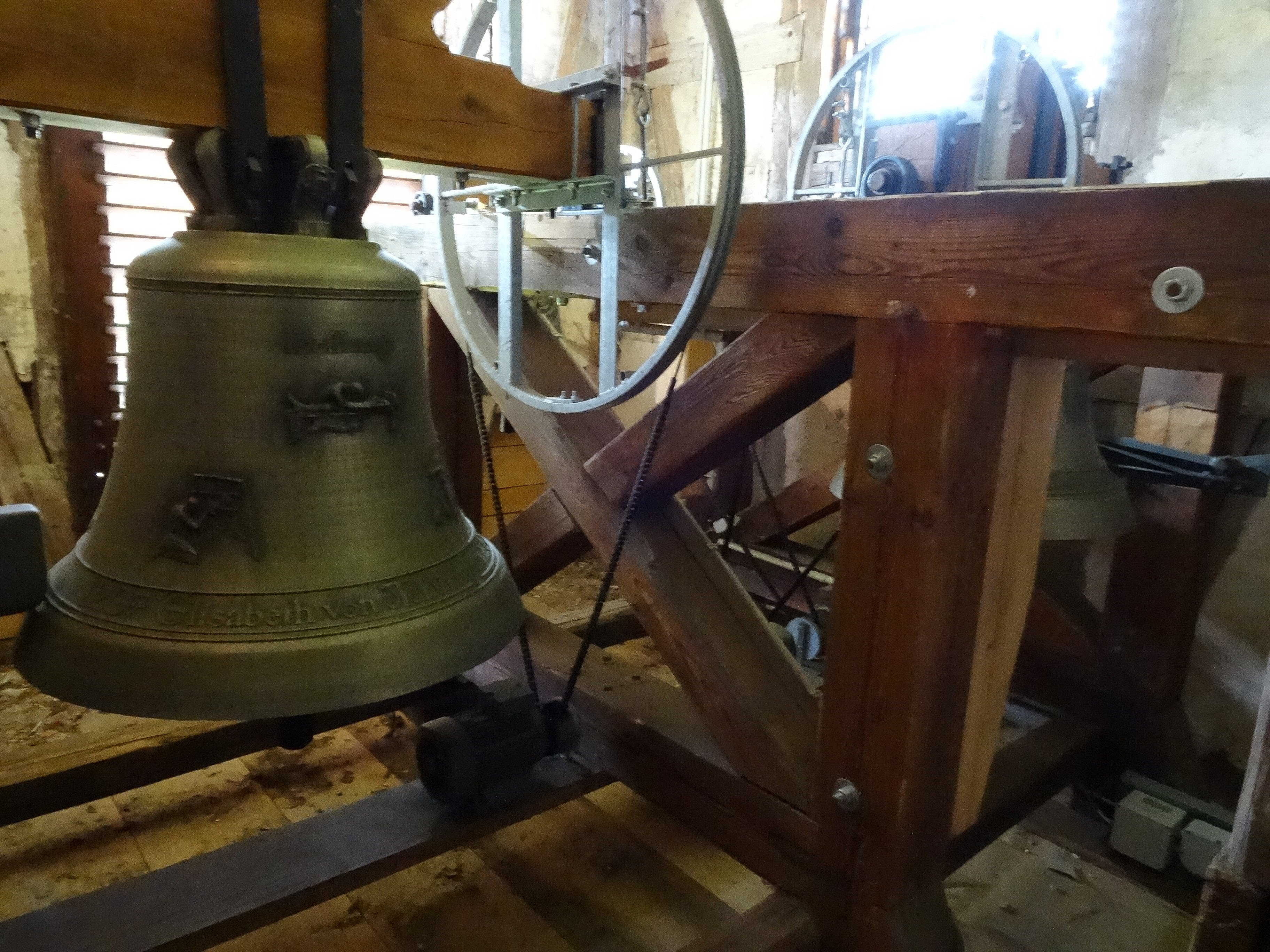 Sankt Elisabethkirche Georgenthal, Glockenstuhl